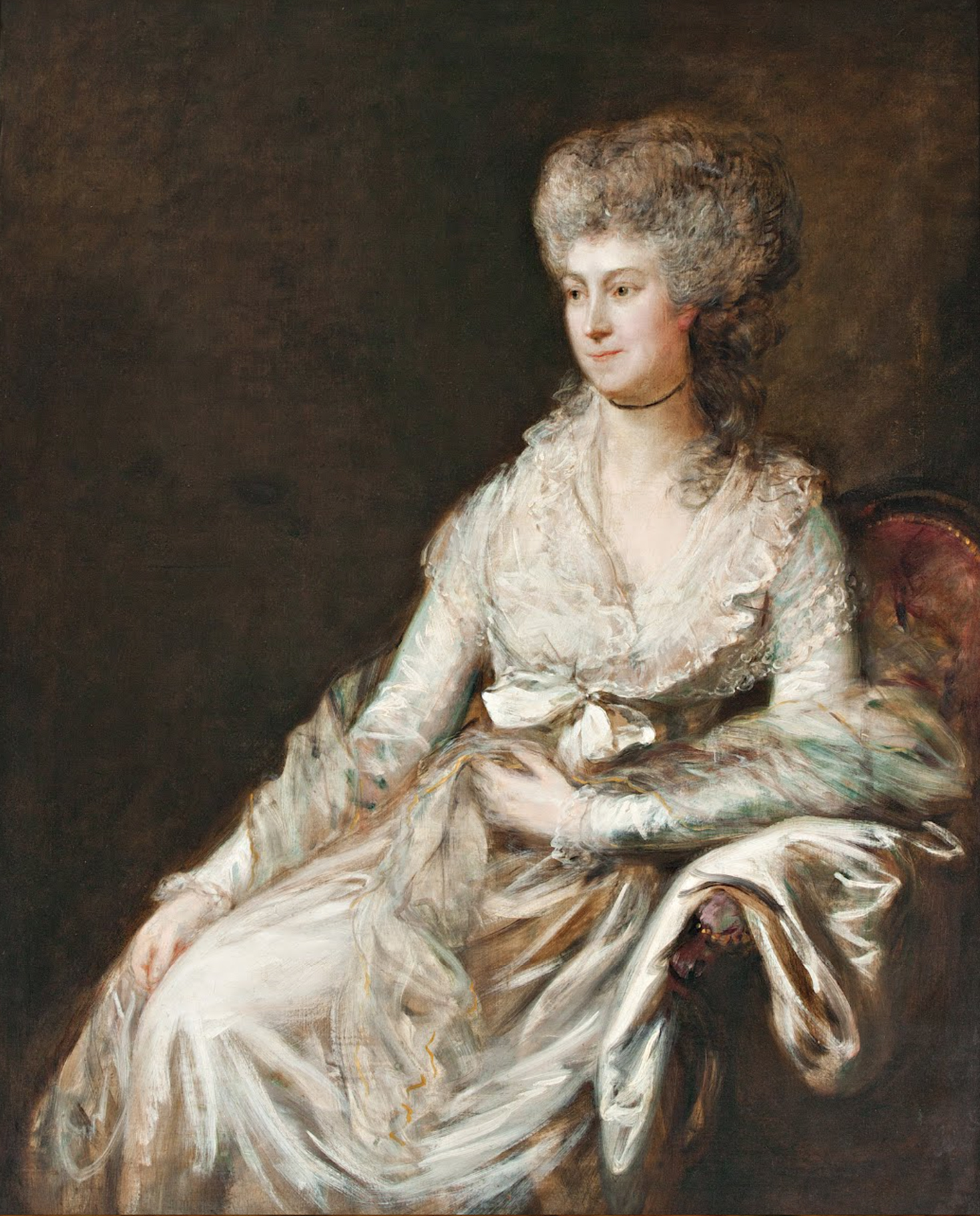 Portrait of Franziska Dorothea Lebrun-Danzi (1756 - 1791)